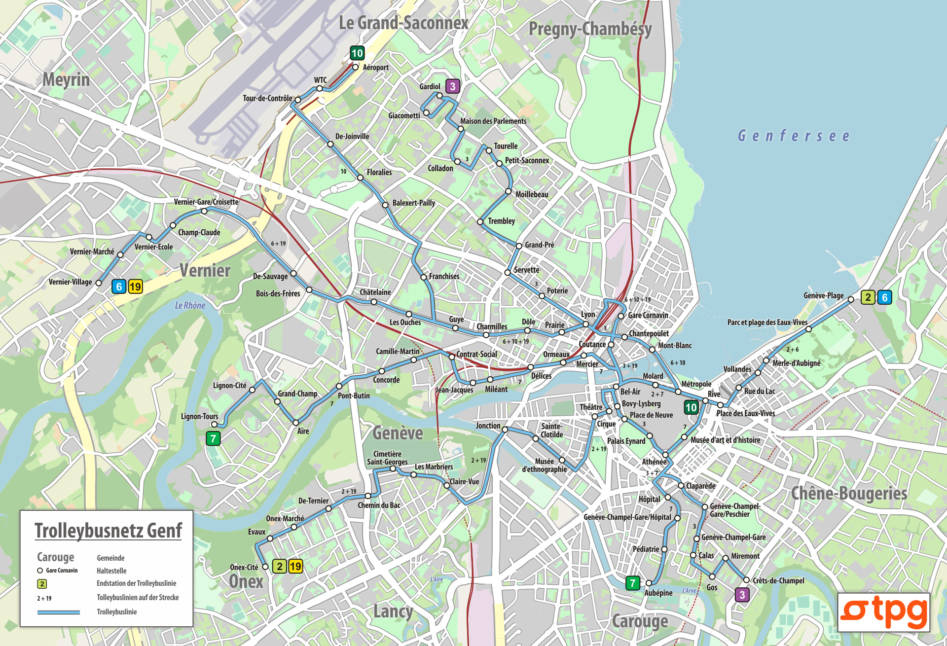 Trolleybusnetzplan des Kantons Genf und Umgebung, ab 15. Dezember 2019